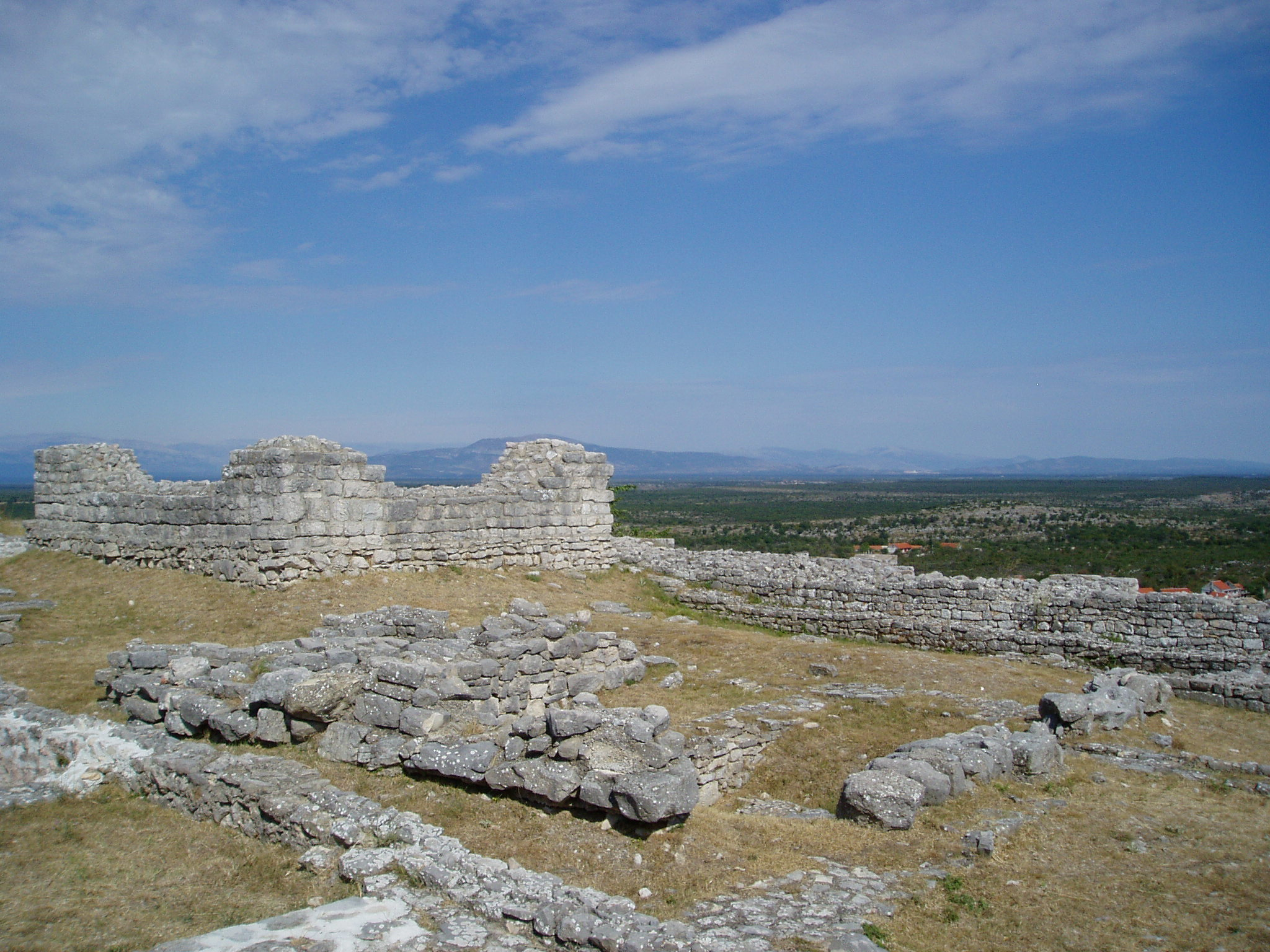 Arheološka zona Bribirska glavica